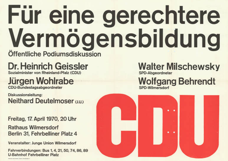 Für eine gerechtere Vermögensbildung Öffentliche Podiumsdiskussion Dr. Heinrich Geissler Sozialminister von Rheinland-Pfalz (CDU) Jürgen Wohlrabe CDU-Bundestagsabgeordneter Walter Milschewsky SPD-Abgeordneter Wolfgang Behrendt SPD-Wilmersdorf Diskussionsleitung Neithard Deutelmoser (J.U.) ... Veranstalter: Junge Union Wilmersdorf CDUPlakatart:AnkündigungsplakatAuftraggeber:JU WilmersdorfDrucker_Druckart_Druckort:Albert Hentrich, Berlin-SteglitzObjekt-Signatur:10-028 : 309Bestand:Plakate von Jugendorganisationen der Parteien ( 10-028)GliederungBestand10-18:Plakate von Jugendorganisationen der Parteien (10-028) » CDU » Veranstaltungsplakate A - ZLizenz:KAS/ACDP 10-028 : 309 CC-BY-SA 3.0 DE